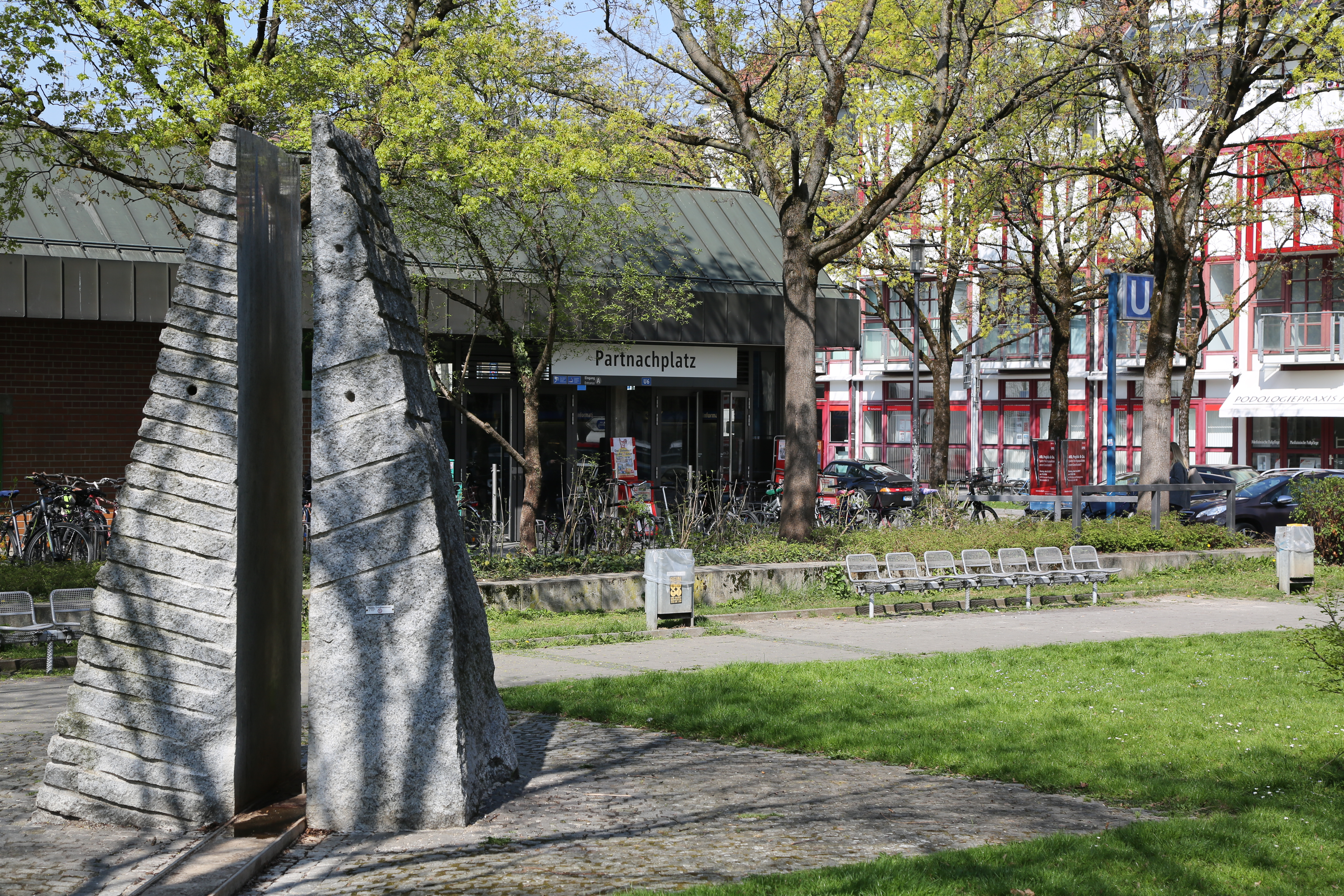 Partnachplatz, München. Der Brunnen in Pyramidenform stammt von Alfred Görig und wurde 1983 errichtet, als der Platz nach dem U-Bahn-Bau umgestaltet wurde.